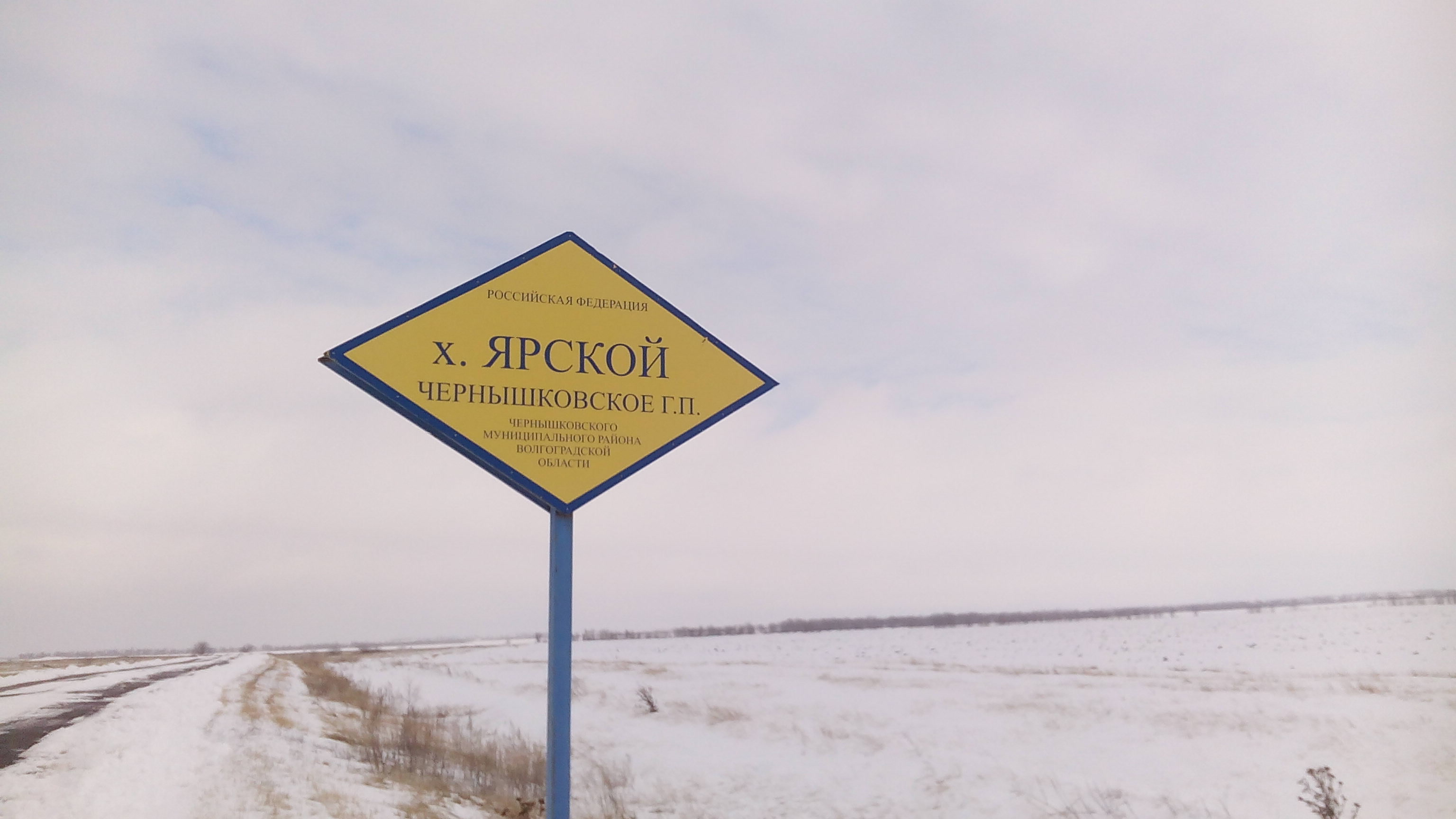 знак при въезде на хутор Ярской со стороны поселка Чернышковский